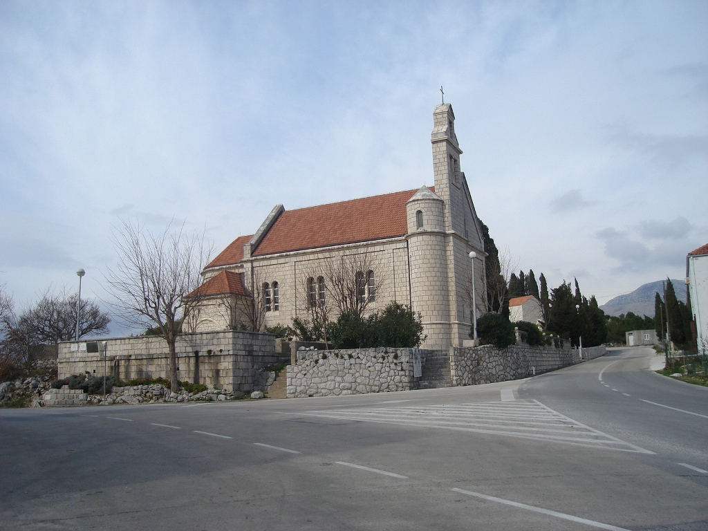 La chiesa di Bergatto Superiore, frazione di Breno